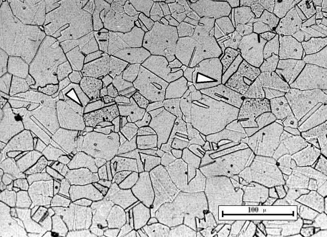 Östenitik Paslanmaz Çelik